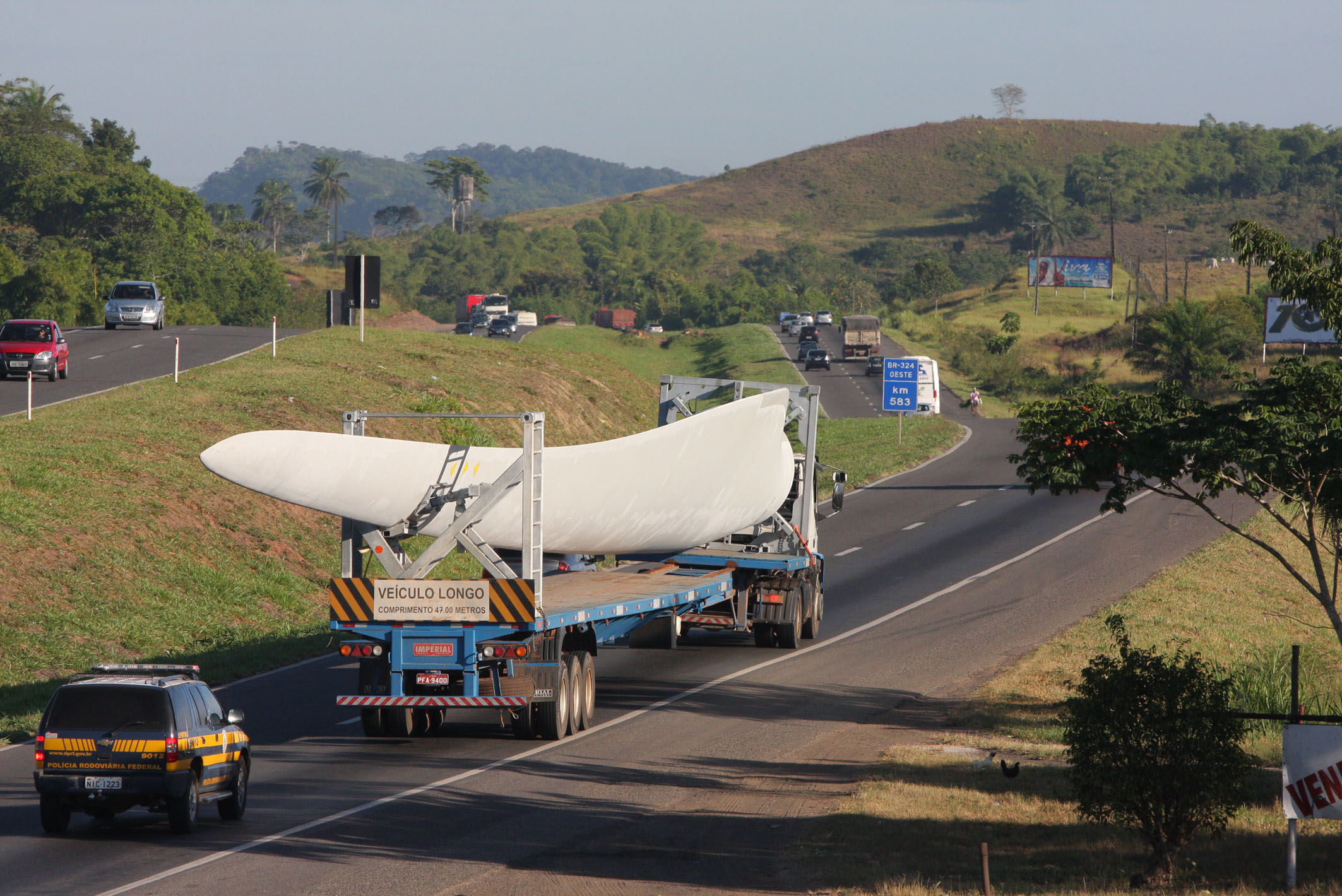 Transporte de Equipamento de Energia Eólica para Brotas de Macaúbas Na foto Foto Adenilson Nunes Data 01/03/11 Local BR 324